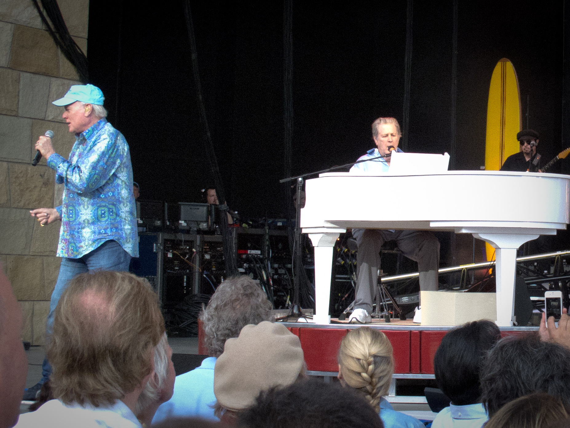 The Beach Boys en su 50 aniversario, Mike Love y Brian Wilson.